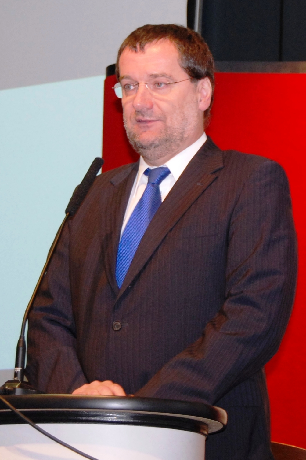 SC Prof. Mag. Dr. Gerhard Gürtlich (2010, TEML)